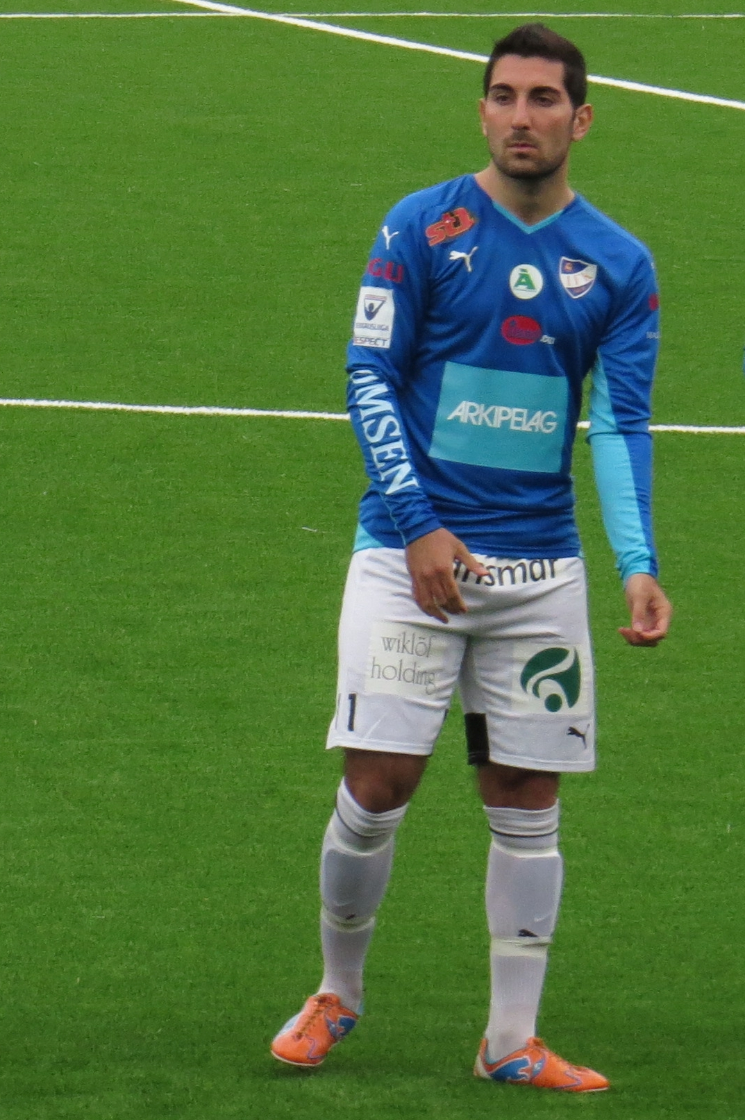 Josef Ibrahim, ruotsalainen jalkapalloilija IFK Mariehamnin joukkueessa kaudella 2015.